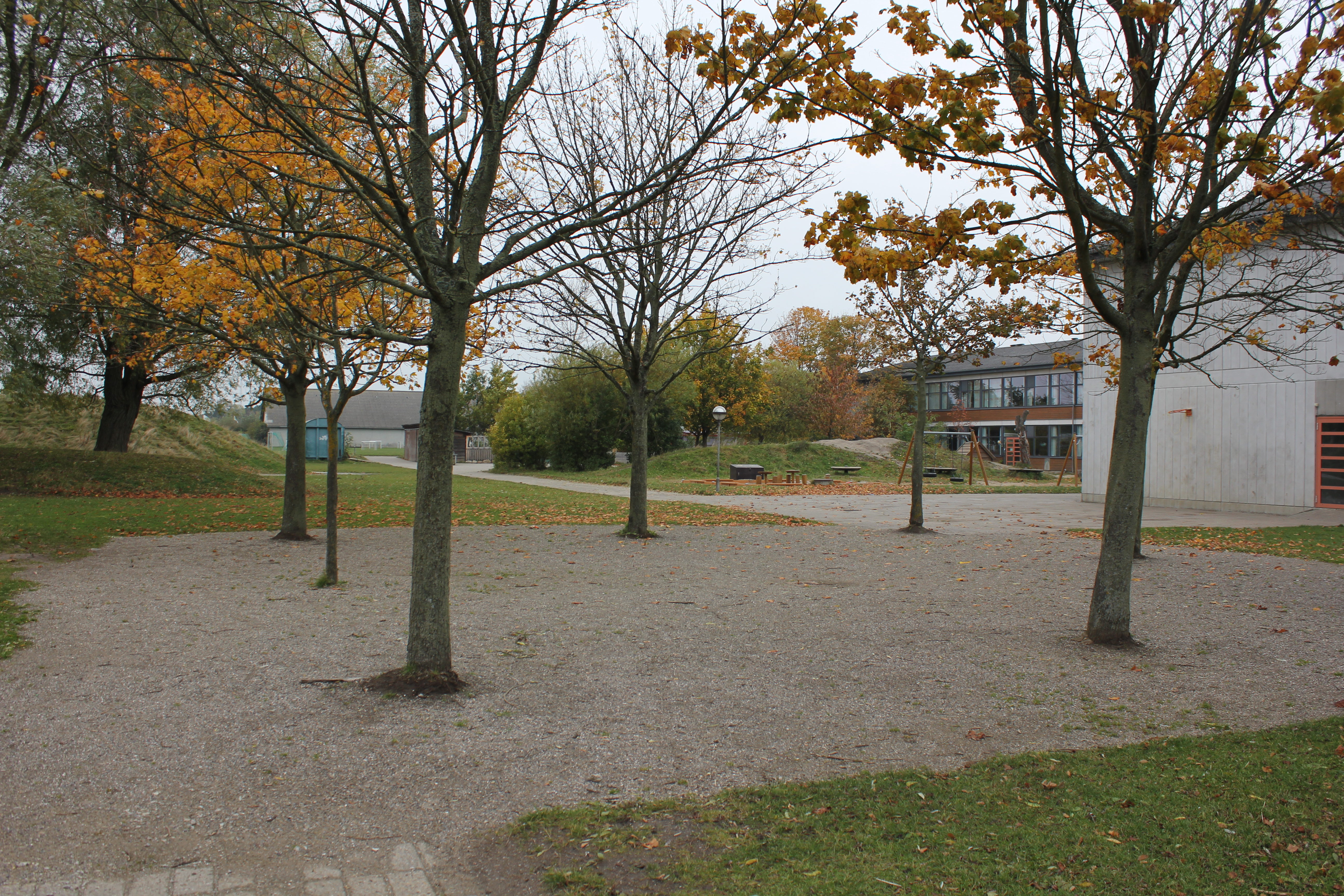 Skæring Skole fra sydøst.